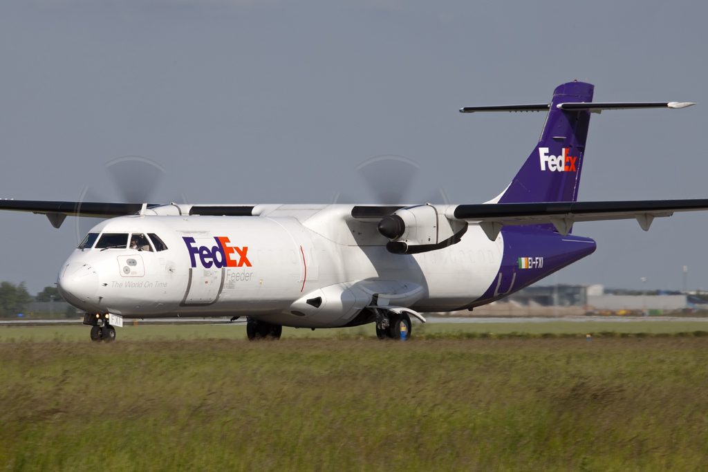 EI-FXI Atr42F Fedex propblur